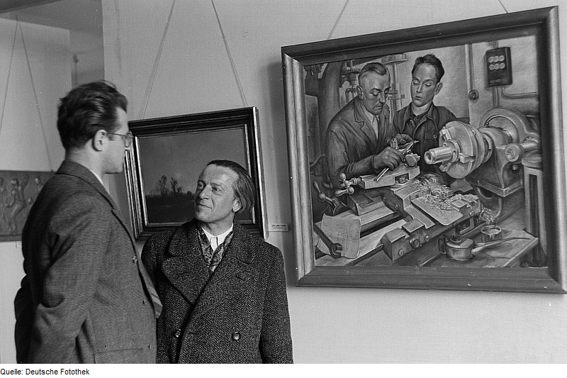 Original image description from the Deutsche Fotothek Portrait Horst Schlossars und eines weiteren Mannes vor Gemälden